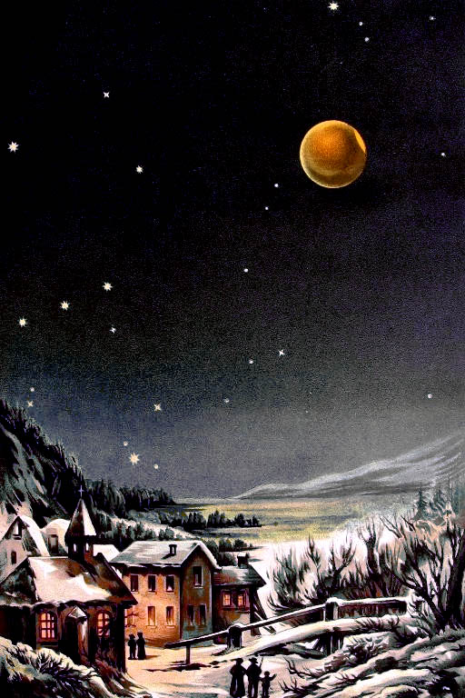 Total Lunar Eclipse